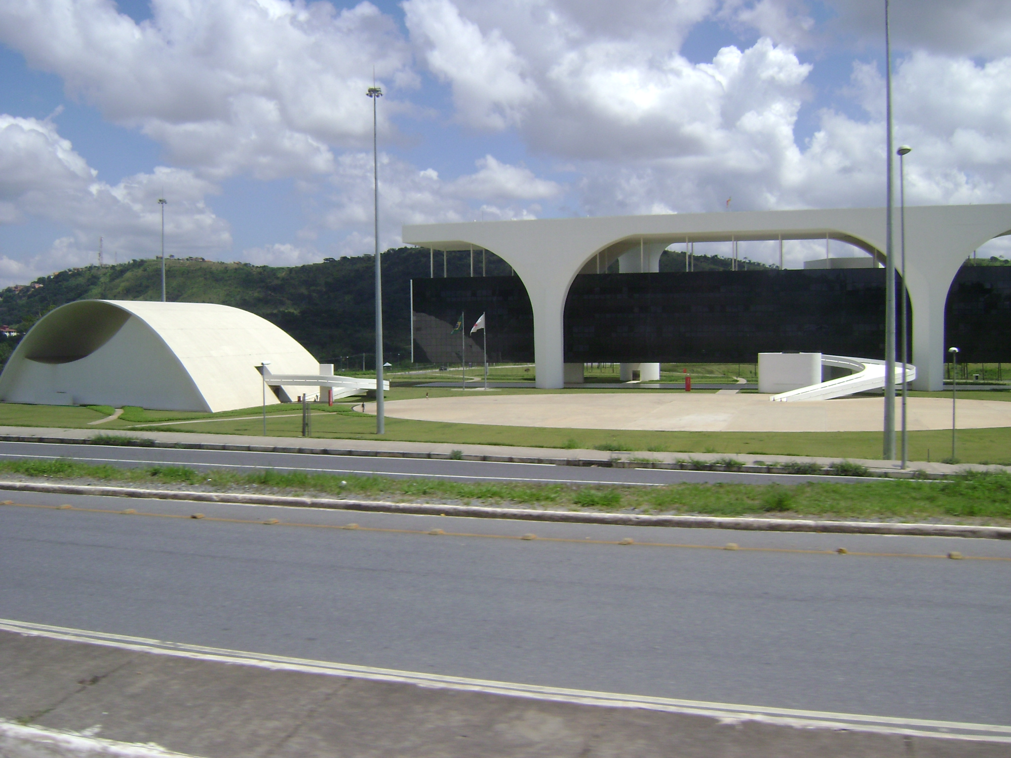 Cidade Administrativa Presidente Tancredo Neves, em Belo Horizonte, Minas Gerais, Brasil.